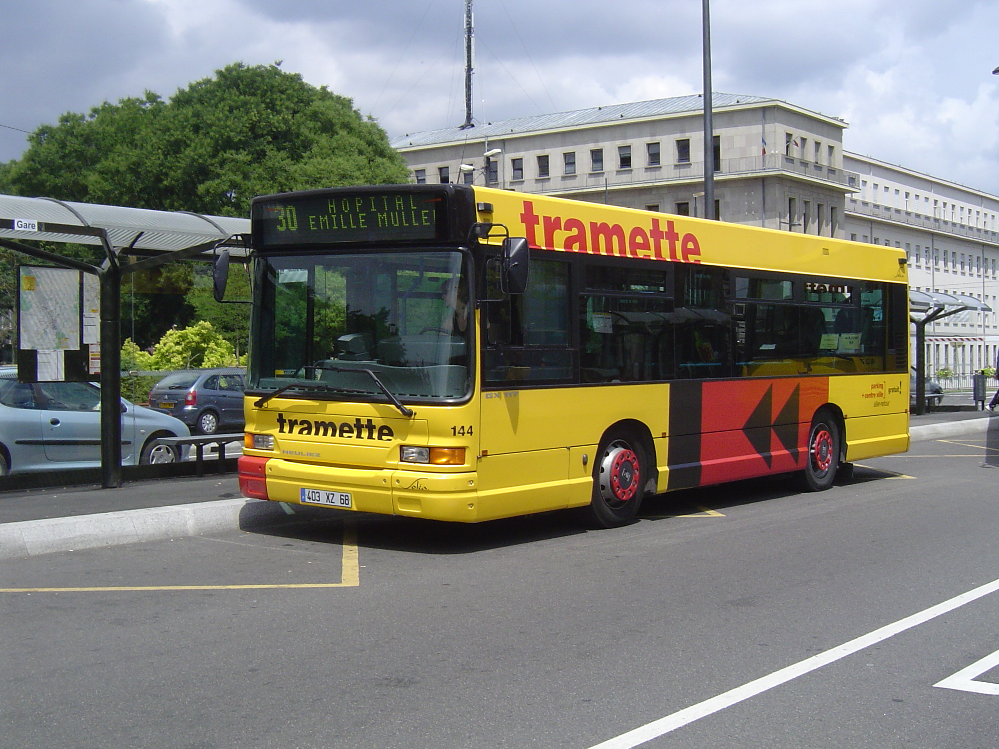 Heuliez GX 117 devant la gare de Mulhouse